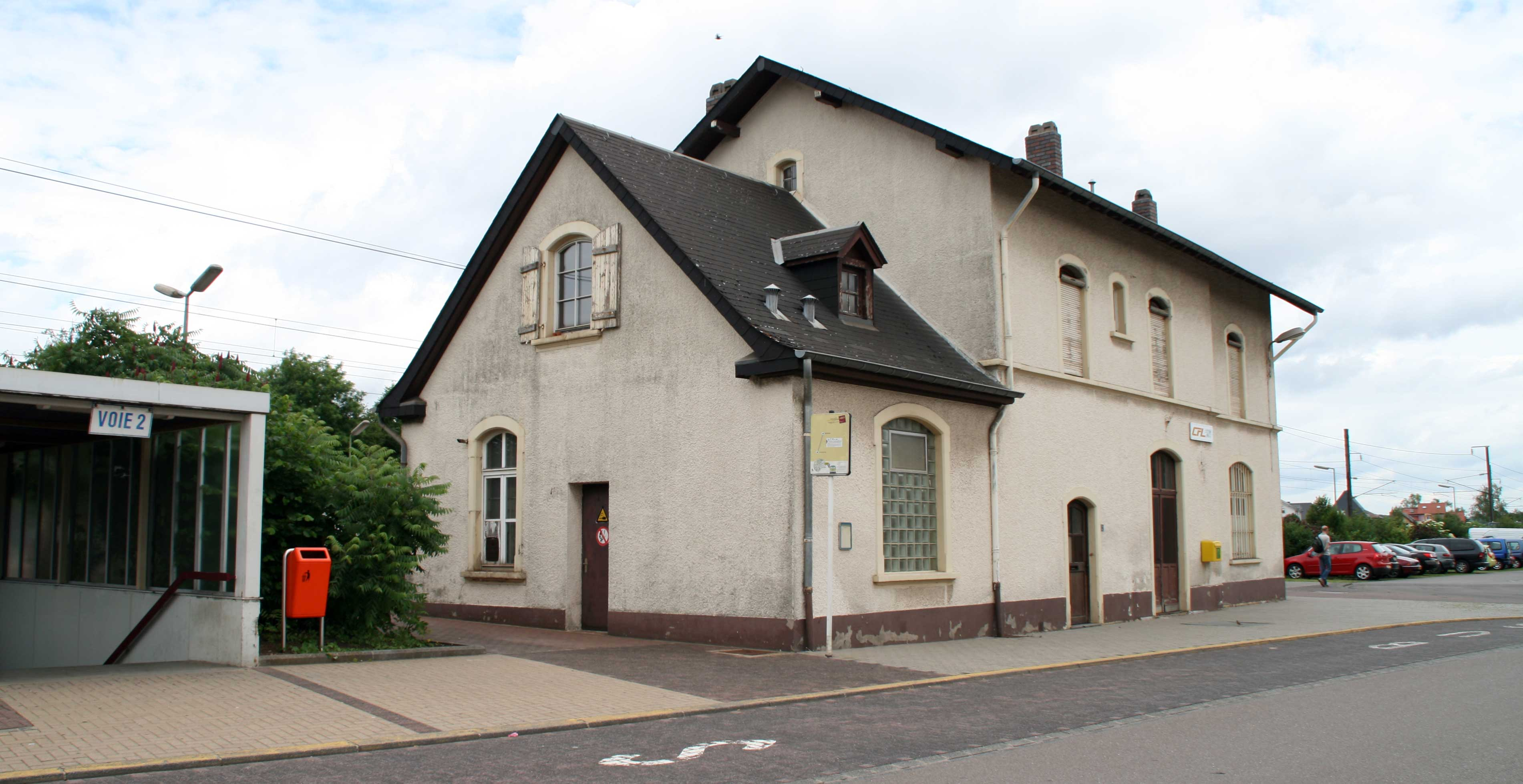 Gare Bierchem.